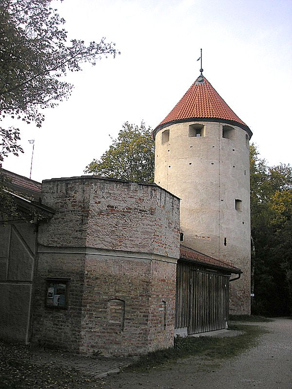 Landsberg am Lech (Oberbayern). „Großer Pulverturm“ der Stadtmauer. Eigene Aufnahme, Okt. 2006 / Landsberg am Lech (Upper Bavaria, Germany). City wall, “Grosser Pulverturm” (“Great Gunpowder tower”). Own photo, Oct. 2006